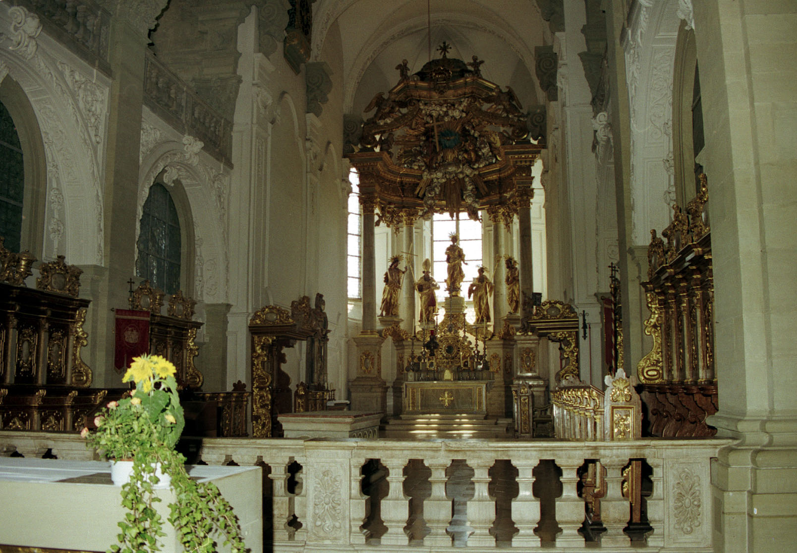 Comburg - Stiftskirche St. Nikolaus - Chor